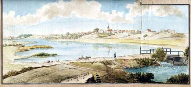 Pilt J. C. Brotze kogust. Tundmatu autori joonistus XVIII sajandi lõpust.